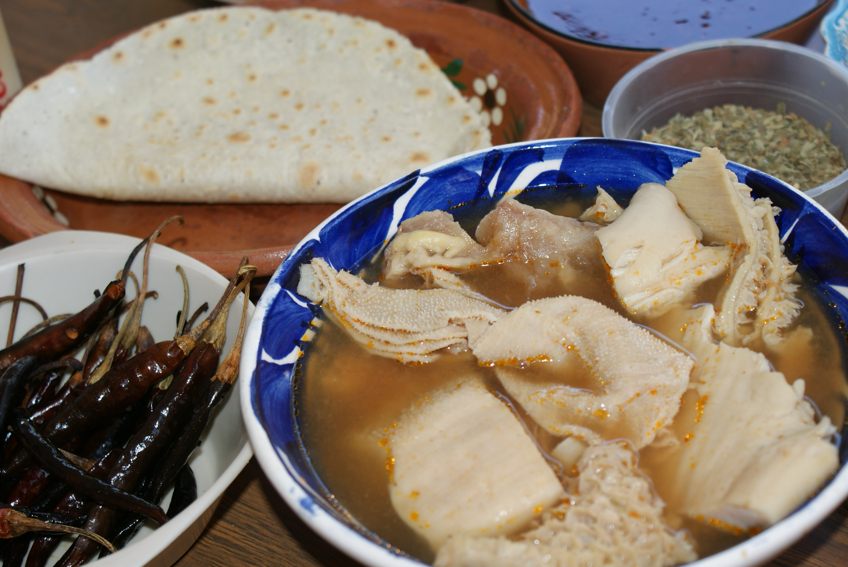 El menudo (pancita) (callos), delicioso caldo de carne del estomago de la res